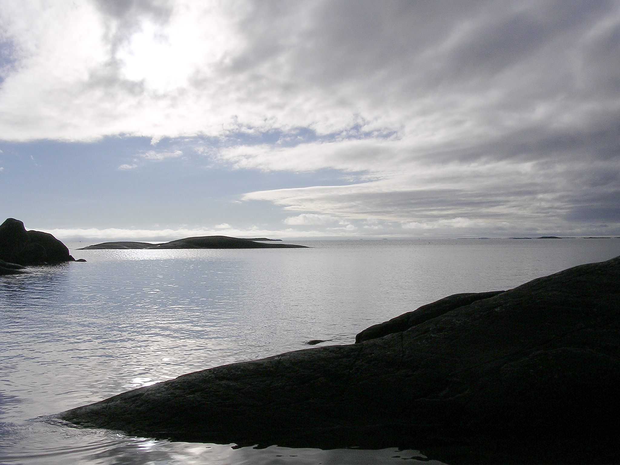 Utsikt över Ramnöflagen och Bråviken från västra Femöre